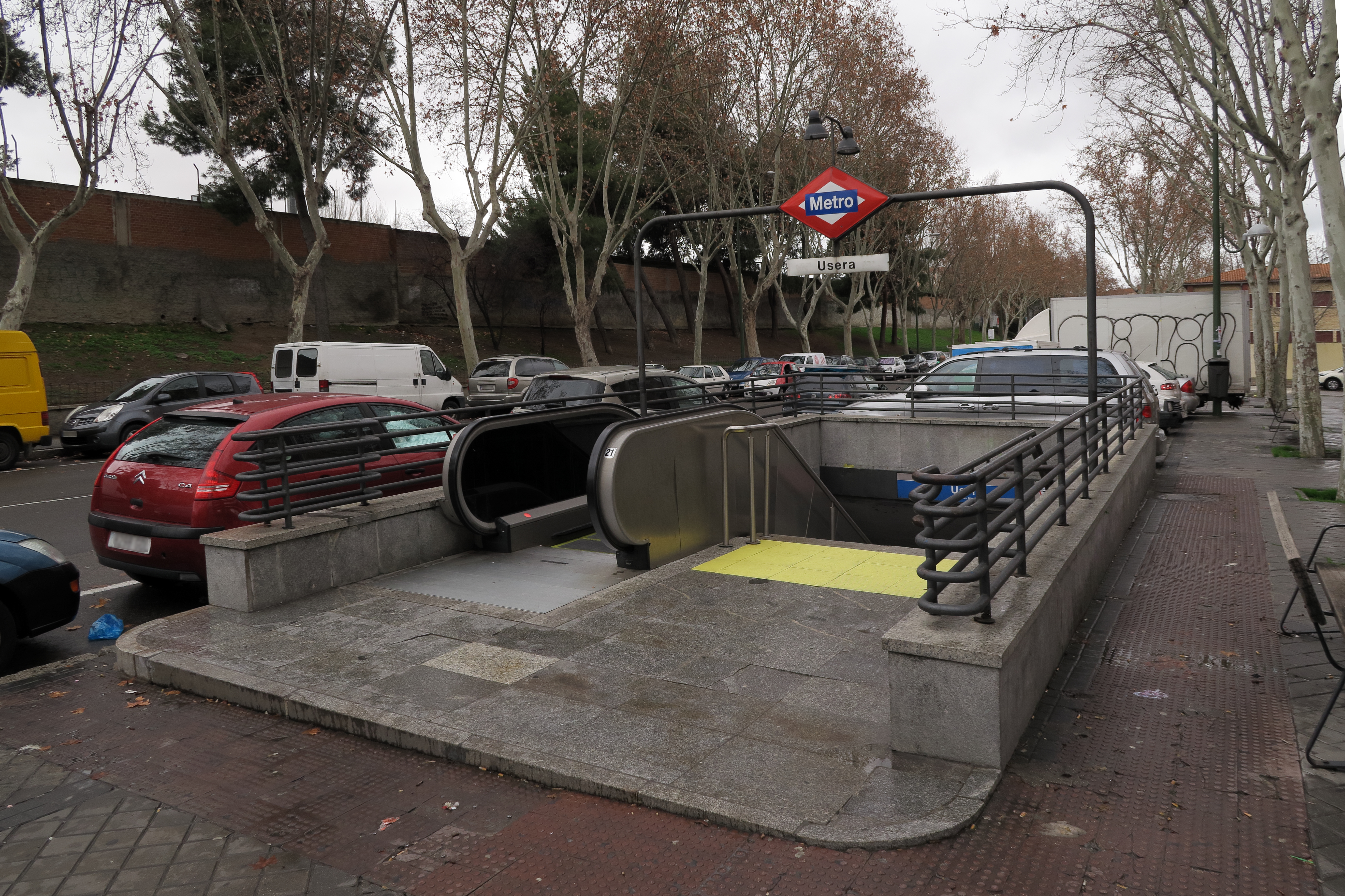 Estación de Usera